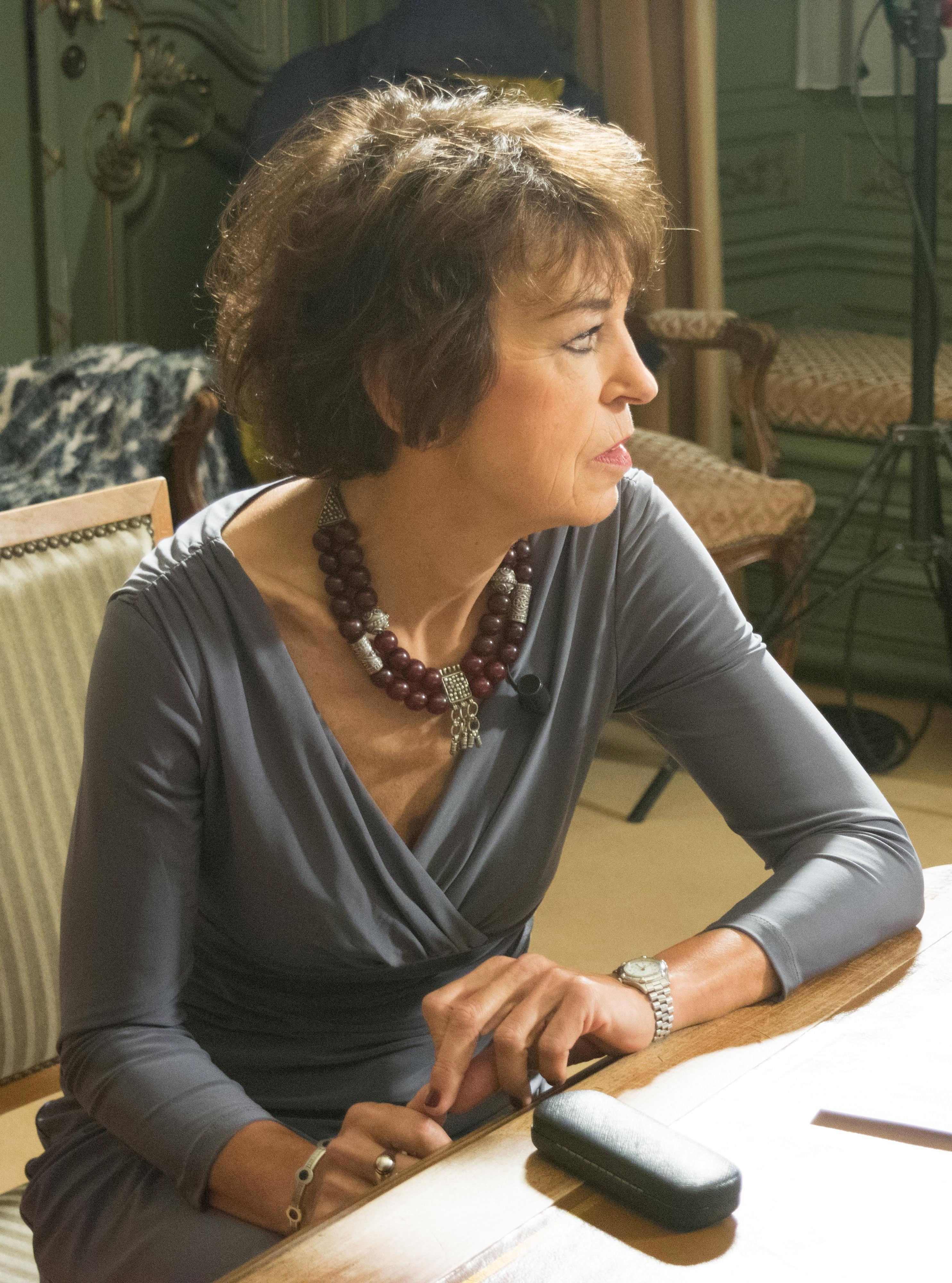 Lieve Joris tijdens het Groot Dictee 2015, in Den Haag.